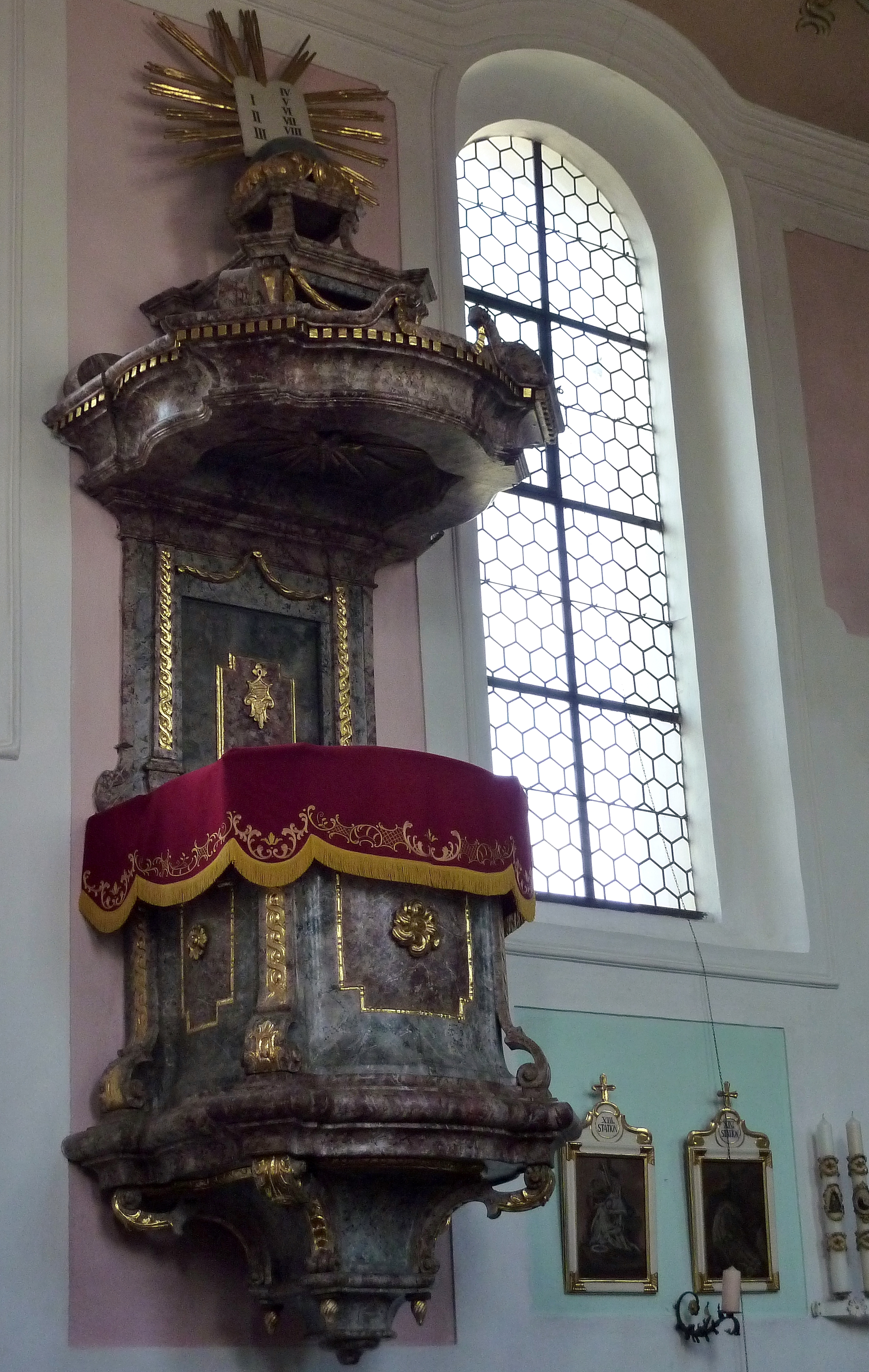 Katholische Pfarrkirche St. Ägidius in Schabringen, einem Ortsteil von Wittislingen im Landkreis Dillingen an der Donau (Bayern), Kanzel um 1780, Schalldeckel mit Weltkugel und Gesetzestafeln in Strahlenkranz